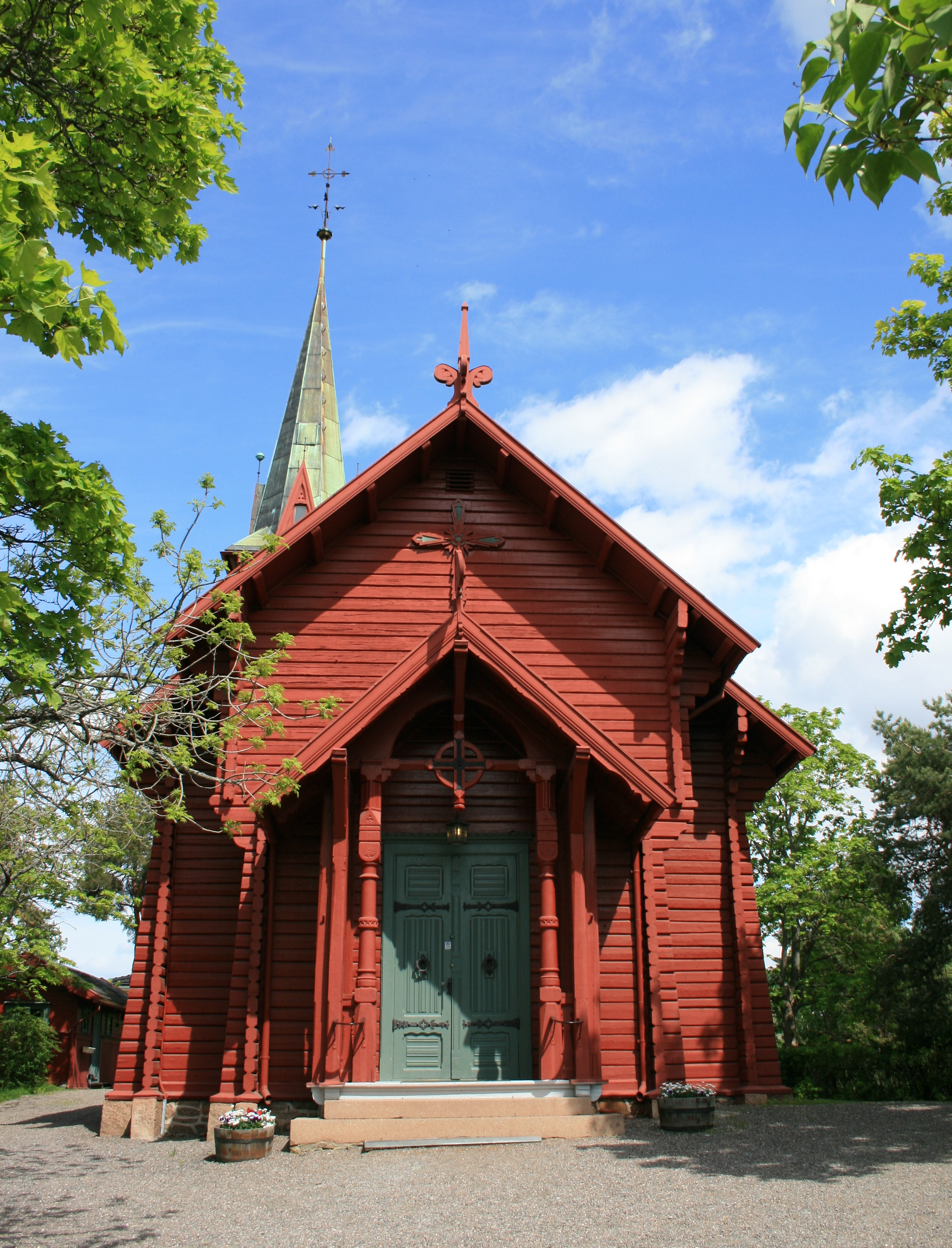 Ormøy kirke er en langkirke fra 1892 på Ormøya i Oslo. Kirken er tegnet av arkitekt Bernhard Christoph Steckmest. Nygotisk stil («Hannoverskolen»), norsk-preget sveitserstil.